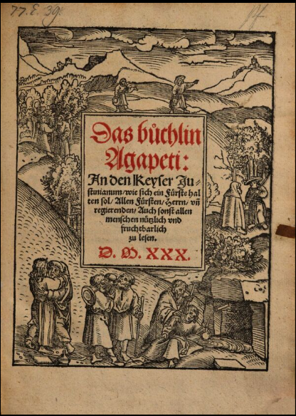 Поучение Агапита на немецком . Издание 1530 года